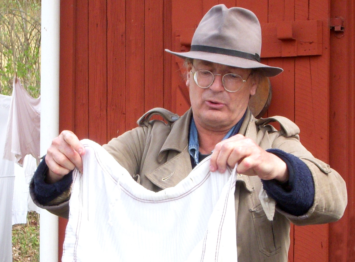 Olle Magnusson i Hagalunds tvätterimuseum